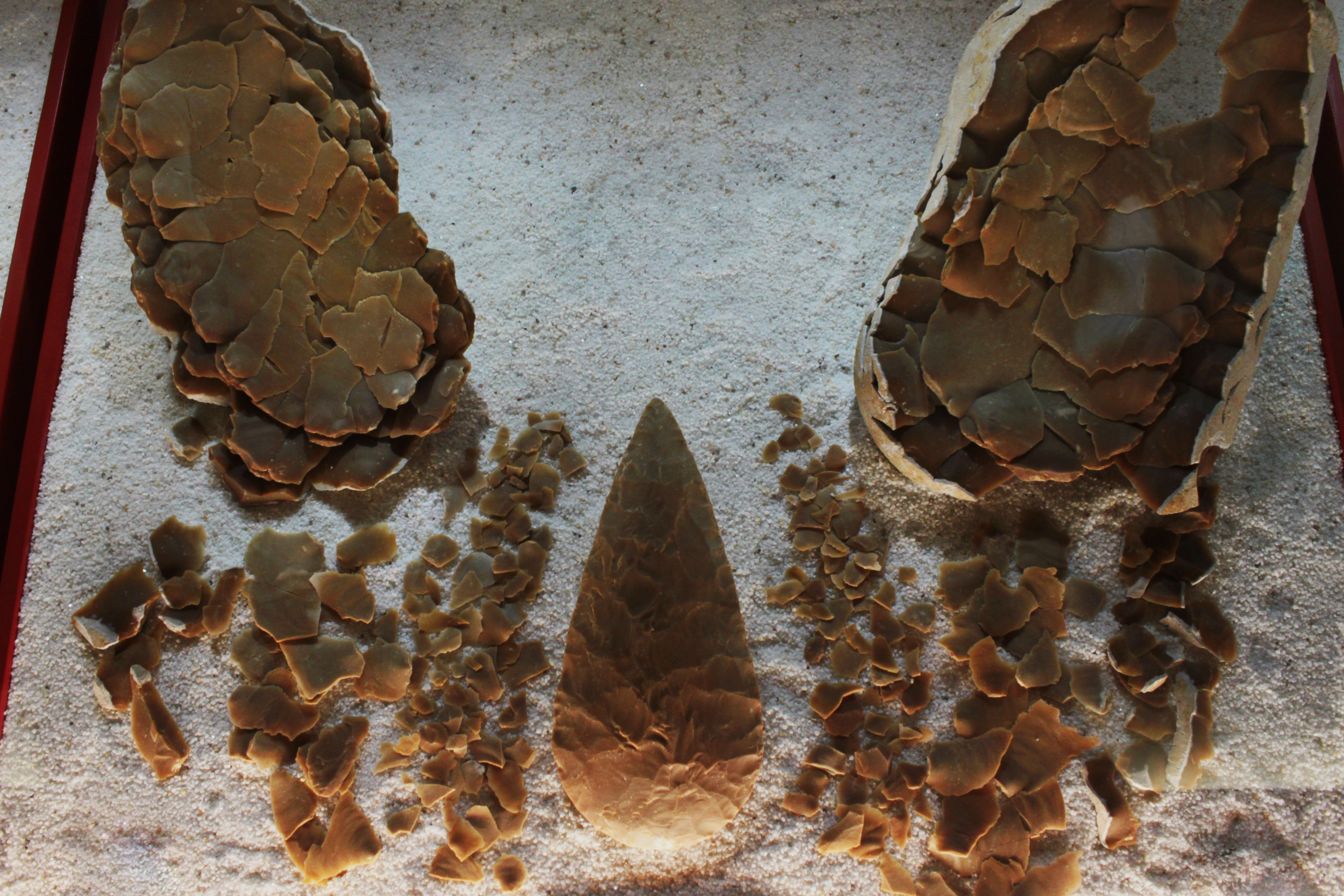 Restos del proceso de fabricación de un bifaz de sílex. Arriba desdechos y descartes del núcleo, abajo lascas aprovechables y bifaz. Fondos del Museo de Prehistoria de Valencia, Comunidad valenciana, España.